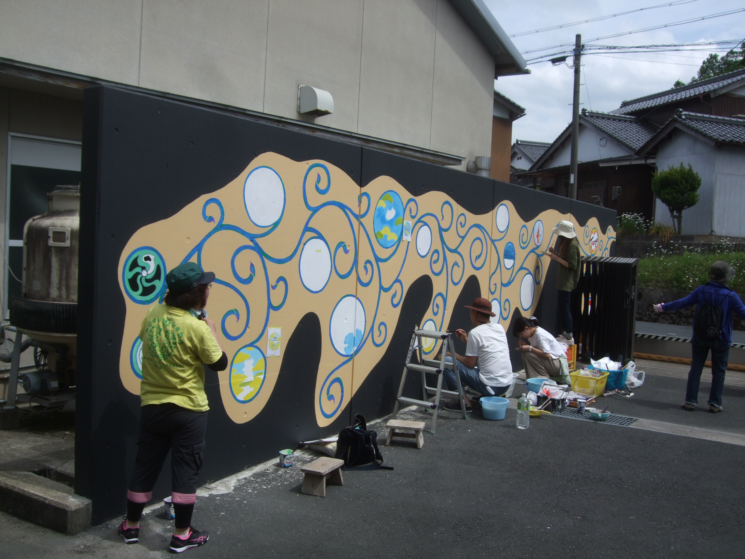 京都府京丹後市峰山町「日進製作所」と「こまねこまつり実行委員会」のコラボレーションによる企画で、制作・デザインはヒカリ美術館。壁画の唐草模様はメソポタミアやエジプトからシルクロードを通じて、日本に伝わり、途切れることなく伸び、生命力が強く、繁栄や長寿などの意味があり、日進製作所の未来と丹後の夢とビジョンを表している。 制作期間は２０１９年５〜６月